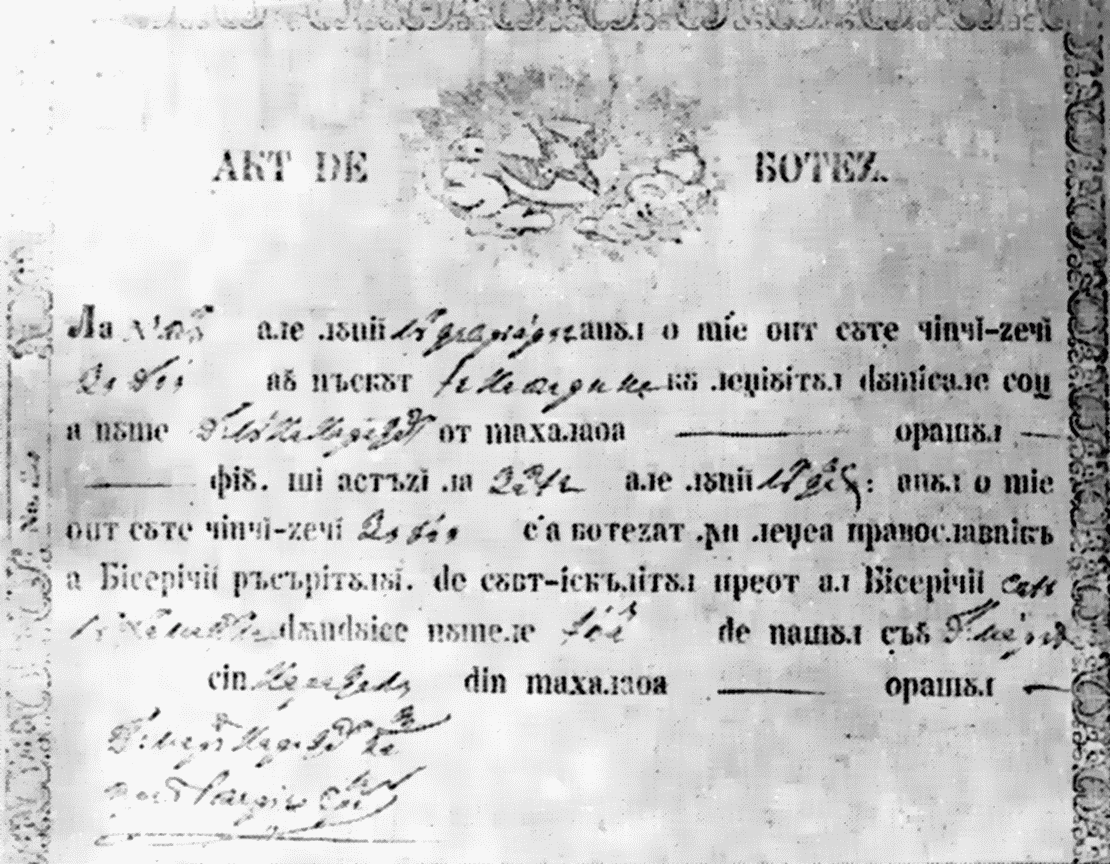 Ion Luca Caragiale's baptise certificate